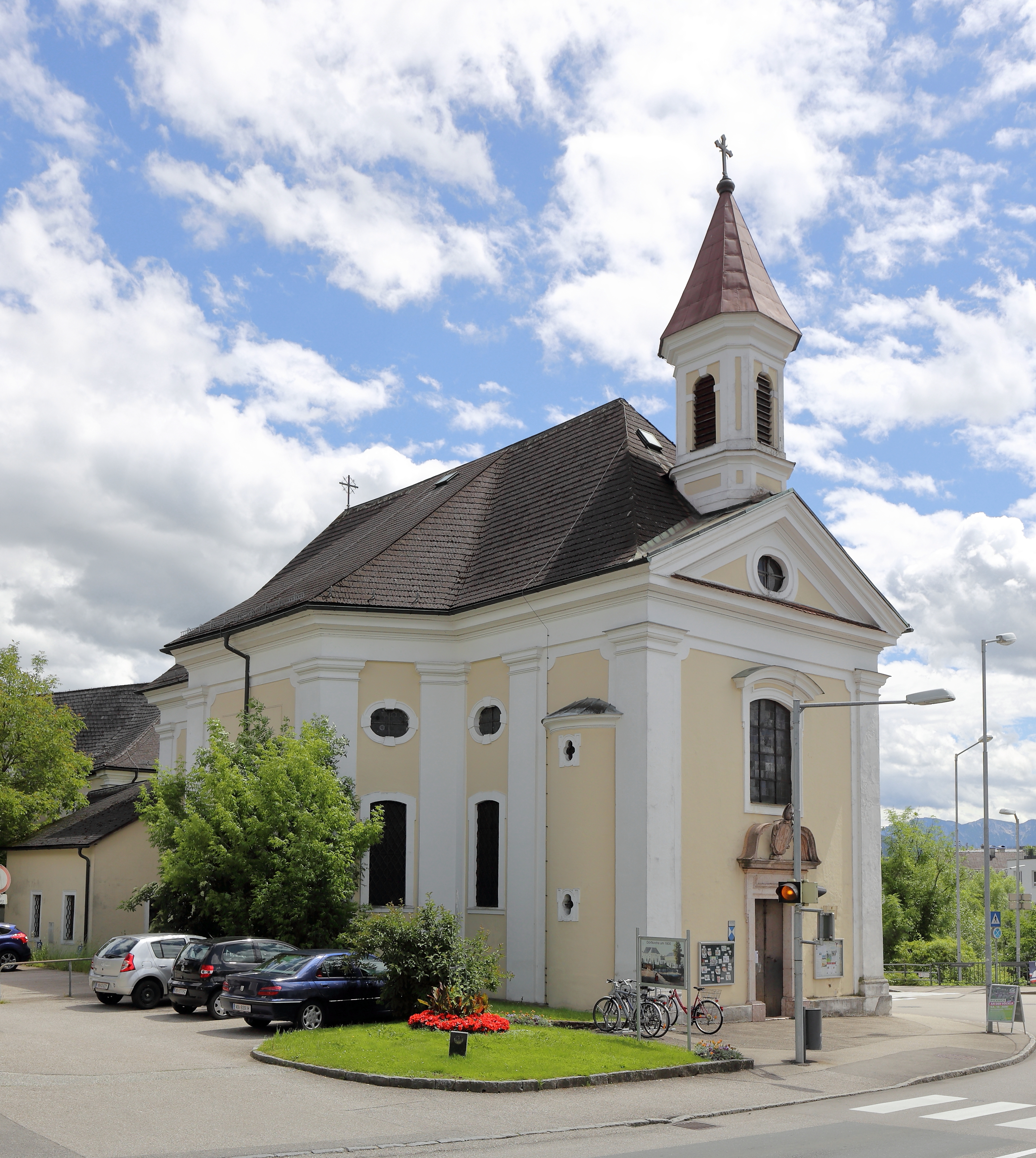 Nordansicht der Dörflkirche in der oberösterreichischen Stadt Vöcklabruck. Erbaut durch Pilgrim von Weng im 12. Jahrhundert und um 1688 von Carlo Antonio Carlone zu einer Kreuzkuppelkirche umgebaut.